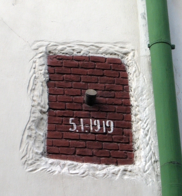 Украинская граната, застрявшая в стене Преображенской церкви (Львов)